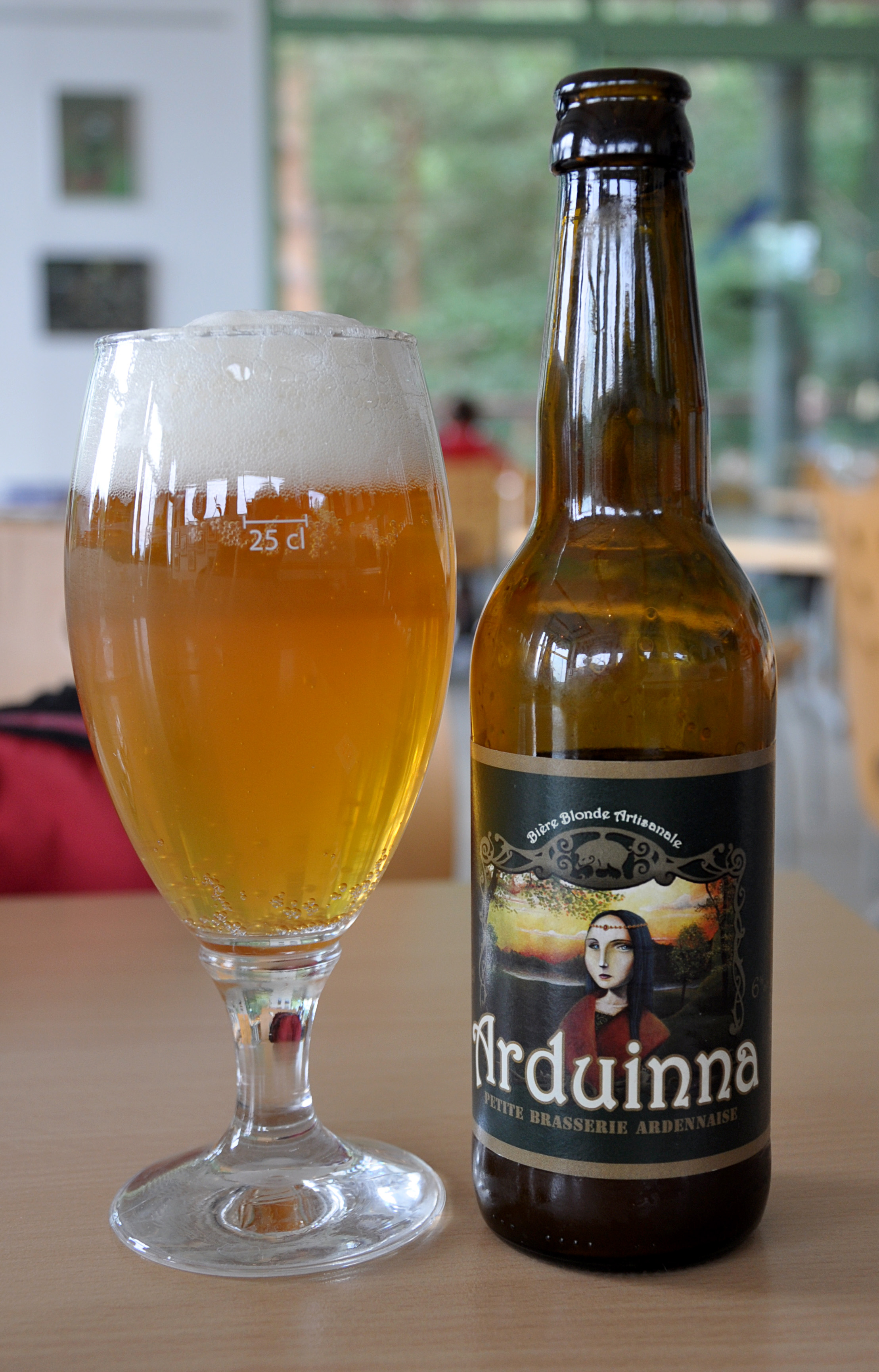 Arduinna